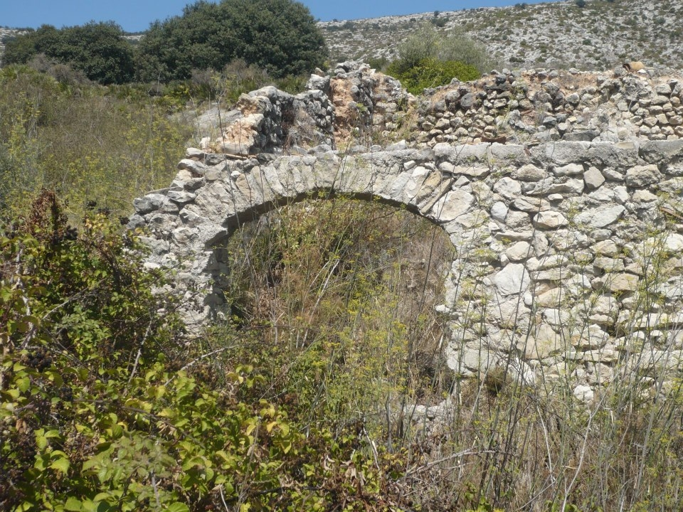 Arc morisc al caseriu de Bijauca, Tàrbena (Marina Baixa).